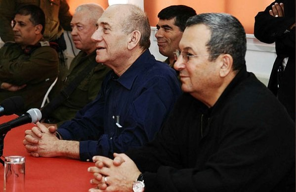 ביקור ראש הממשלה אהוד אולמרט באוגדת עזה של צה"ל. בתמונה לפי הסדר: אהוד ברק, אהוד אולמרט, יואב גלנט, מאיר כליפי. מאחורי גלנט ואולמרט: גבי אשכנזי.